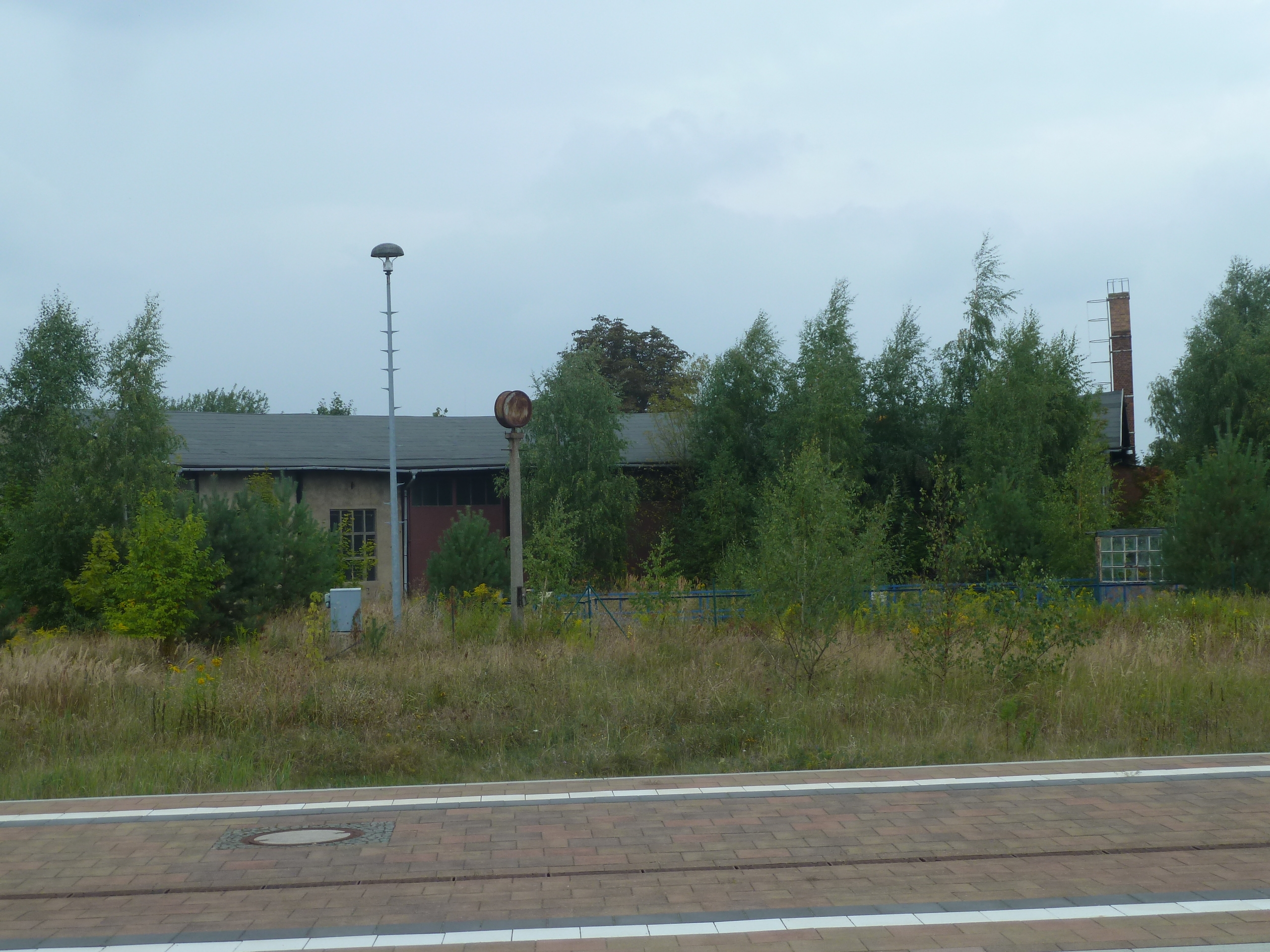 Bahnhof Parchim, ehemaliger Lokschuppen